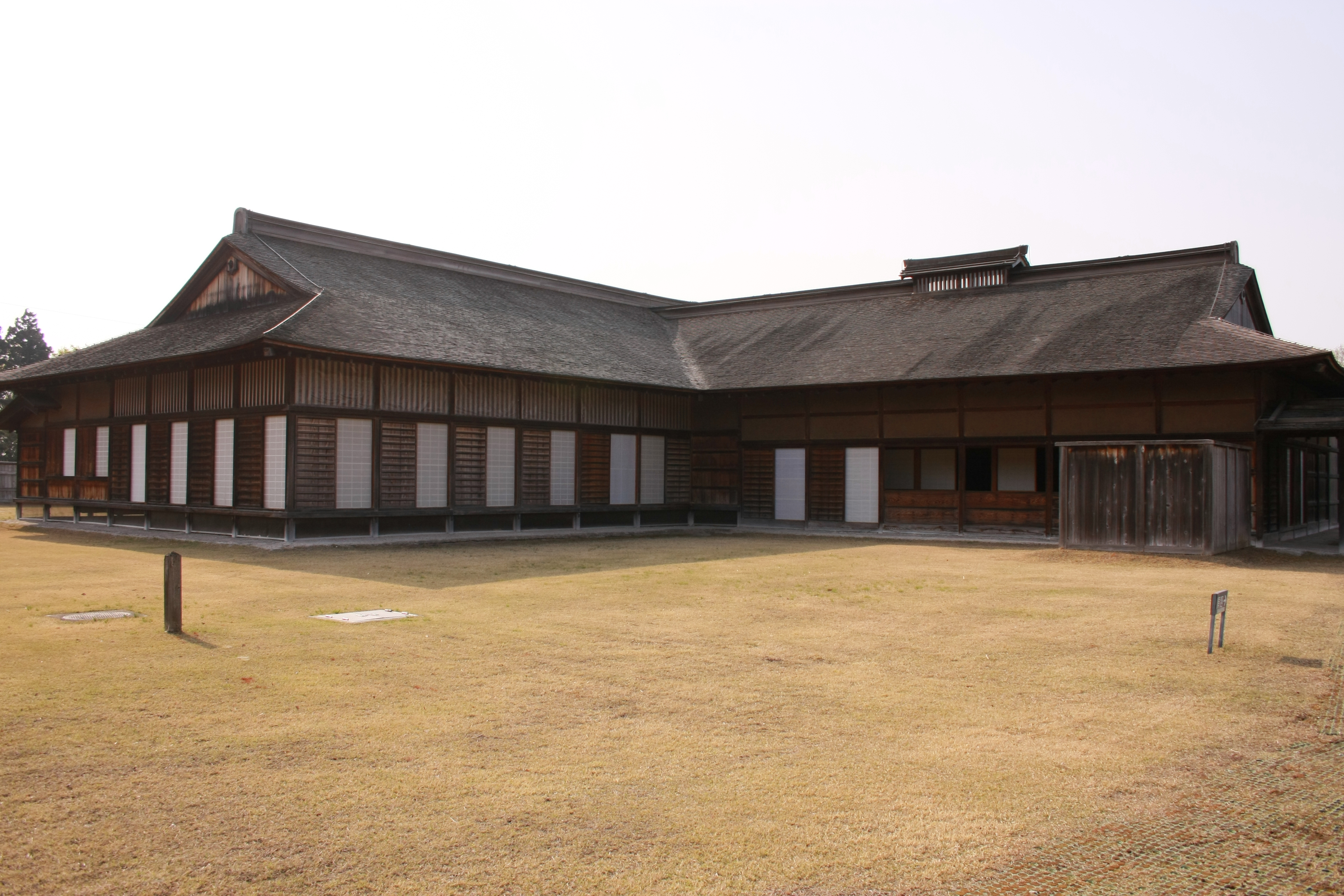 復元された根城の主殿